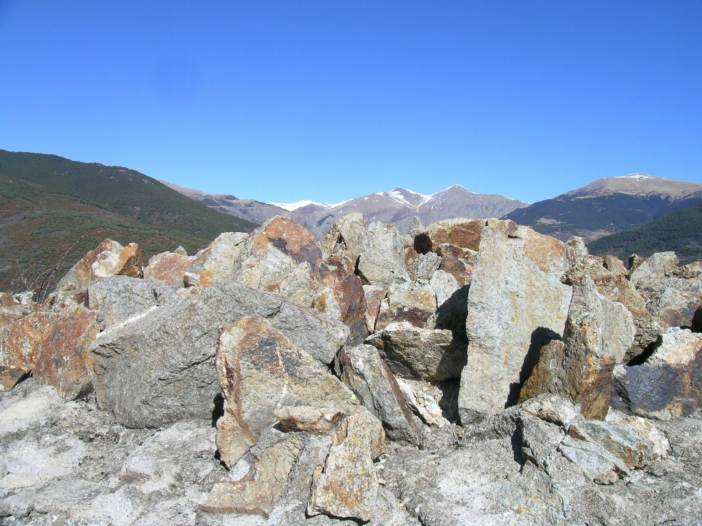 Vista dels Torreneules des dels Coforns